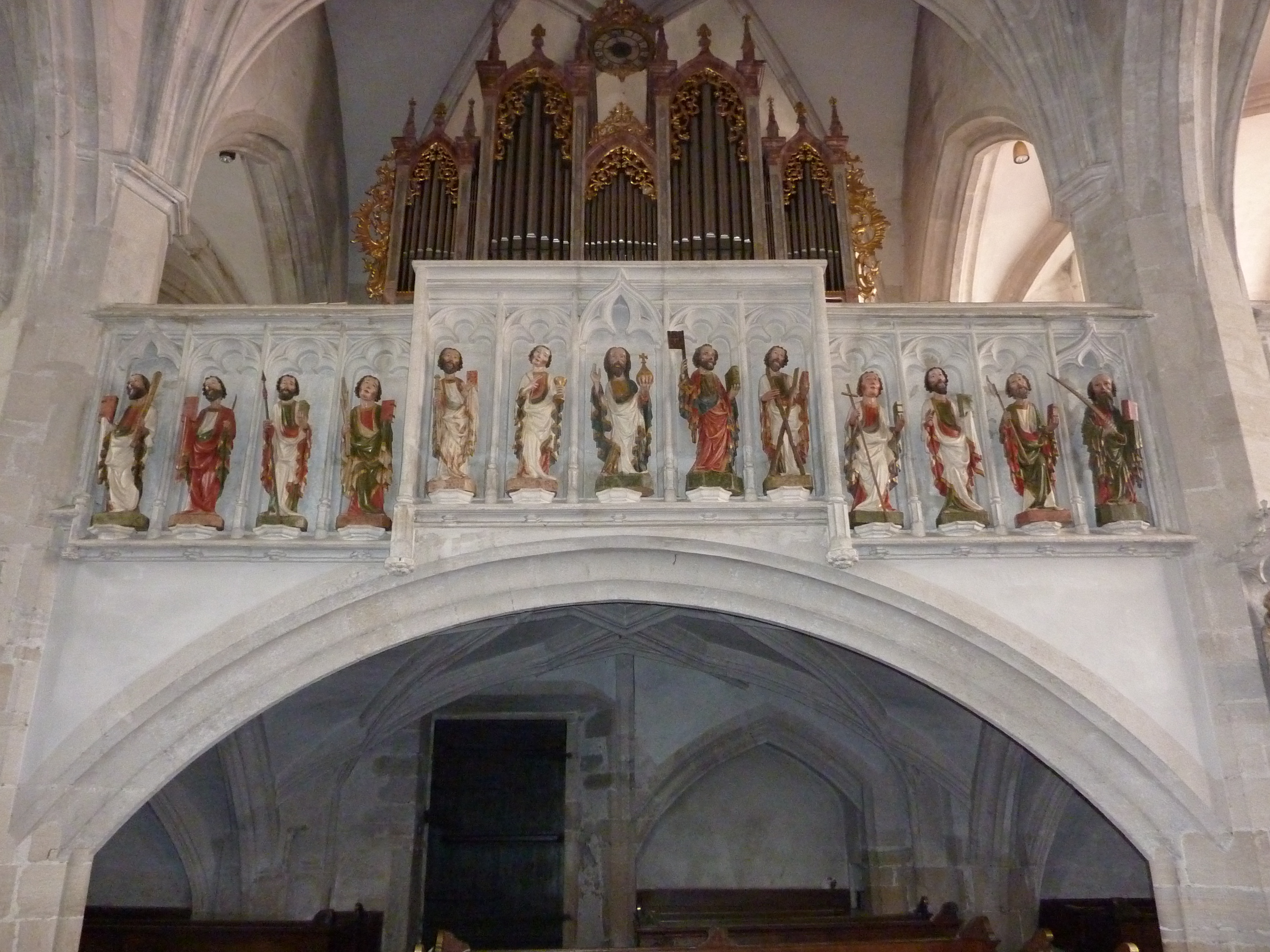 Apostelstatuen an der Orgelbrüstung in der Pfarrkirche in Spitz an der Donau in Niederösterreich